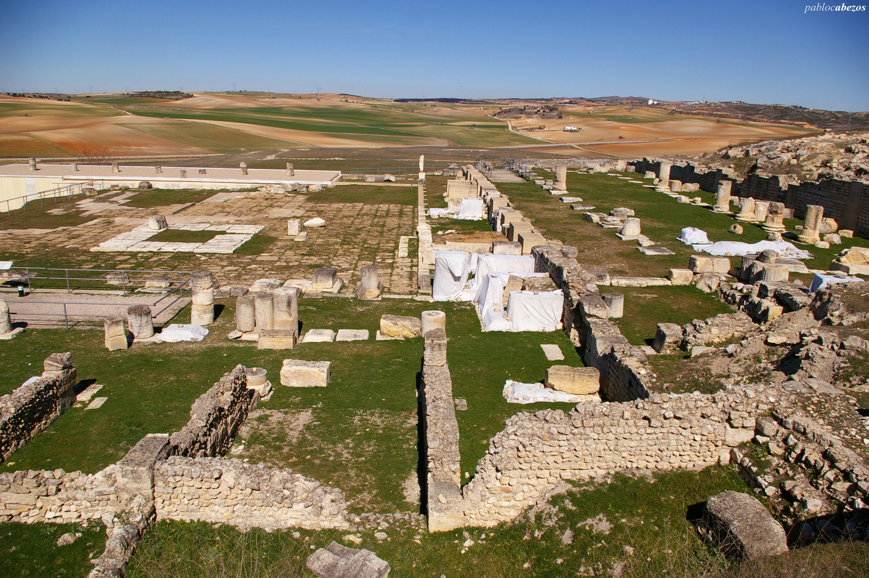 Ruinas romanas del Foro de Segóbriga, en la provincia de Cuenca (España).